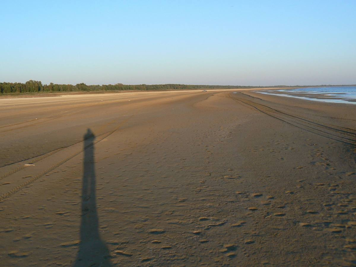 Madala veeseisu ajal paljandunud järvepõhi Valma küla juures